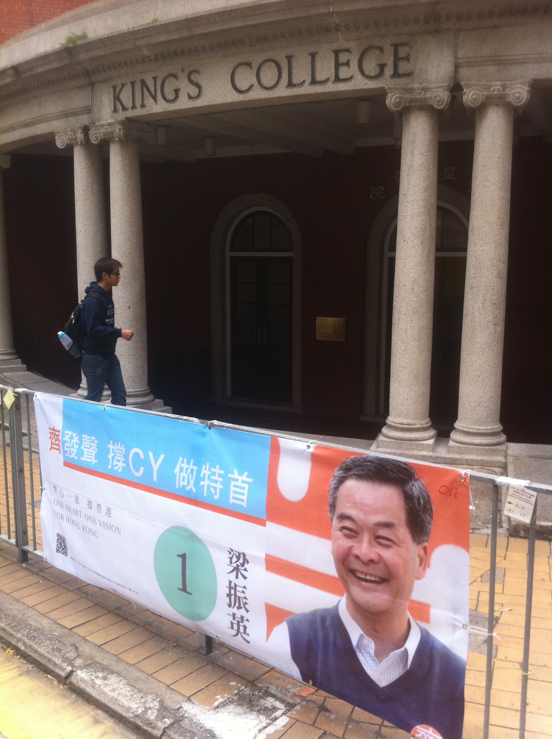 中文（香港）: 2012年香港特別行政區行政長官選舉 - 梁振英 之競選橫額